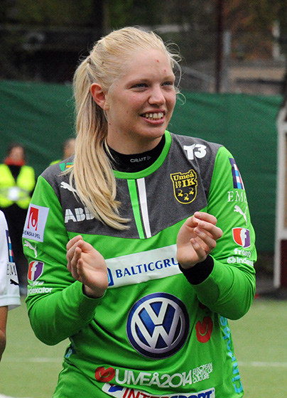 Umeå IK goalkeeper Malin Reuterwall